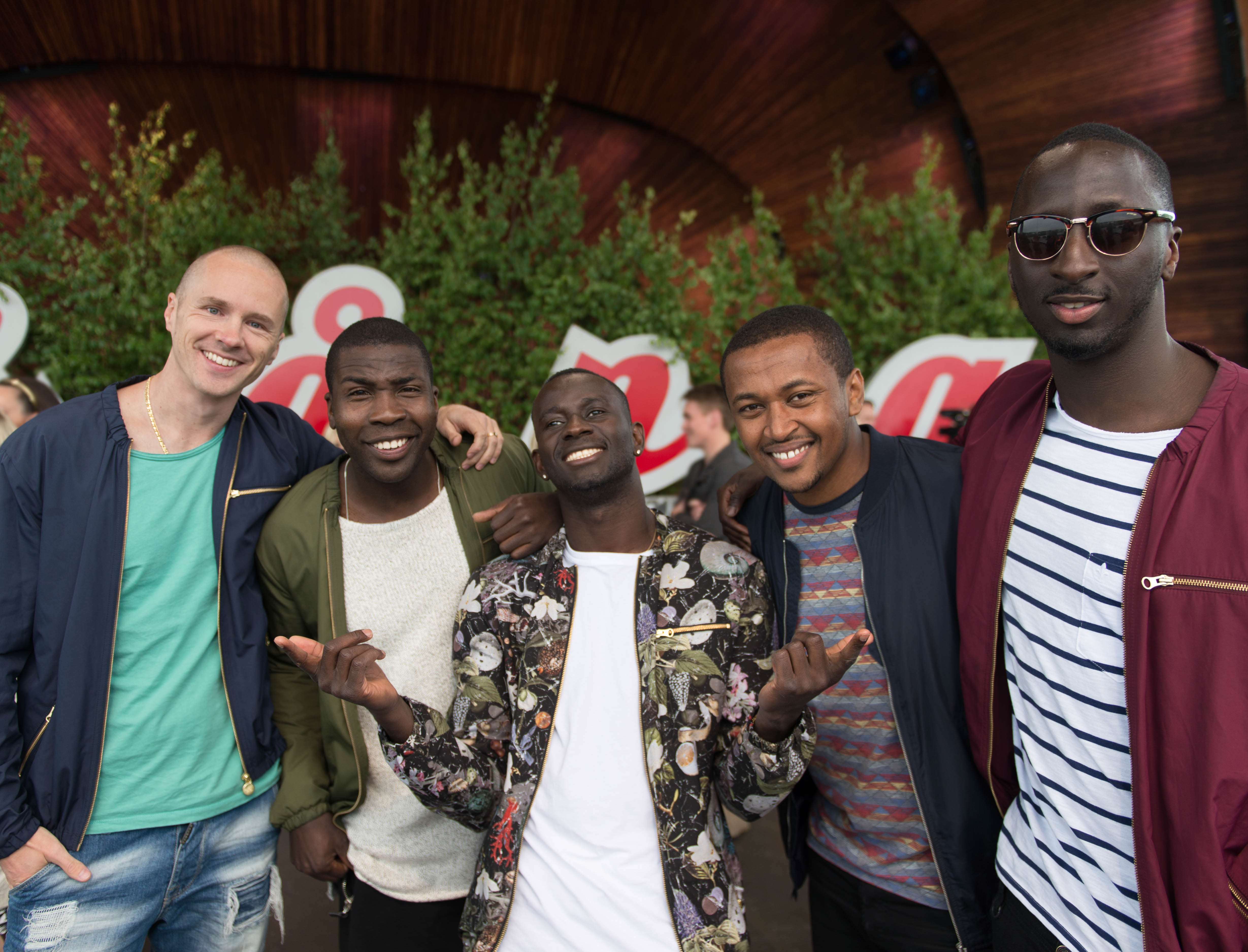 Artisterna för Allsång på Skansen presenteras den 10 juni 2015 på Skansen i Stockholm.